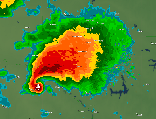 Radar görüntüsü